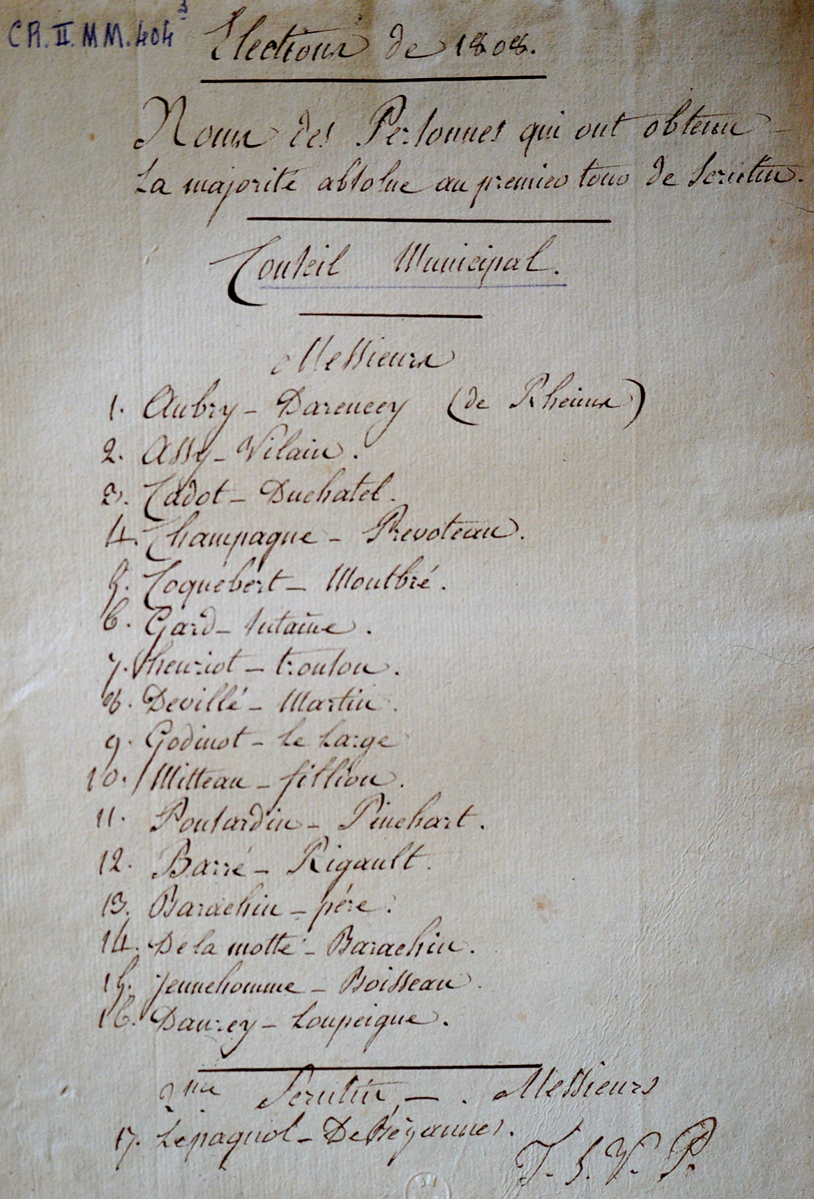 issu du fond de la bibliothèque municipale de Reims.